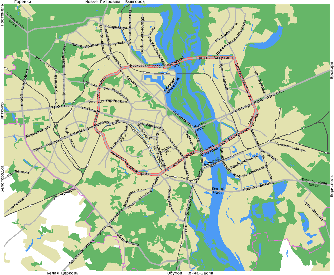 г. Киев